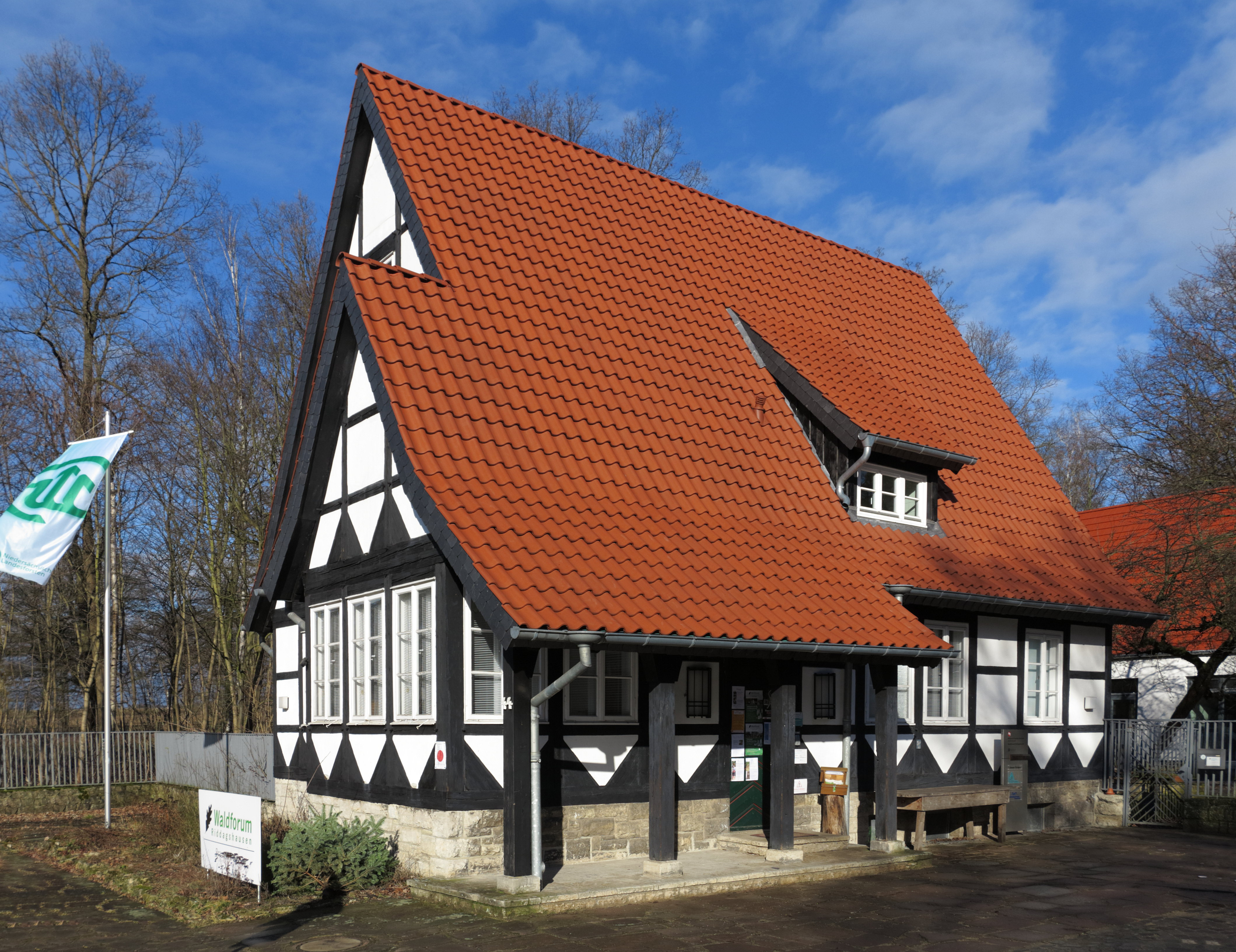 Braunschweig: das Waldforum Riddagshausen in der Ebertallee. Das Fachwerkhaus wurde 1935 als Pförtnerhaus des „Reichsjägerhofs“ errichtet. Es wurde 1997 durch das Niedersächsische Forstamt Braunschweig erworben.